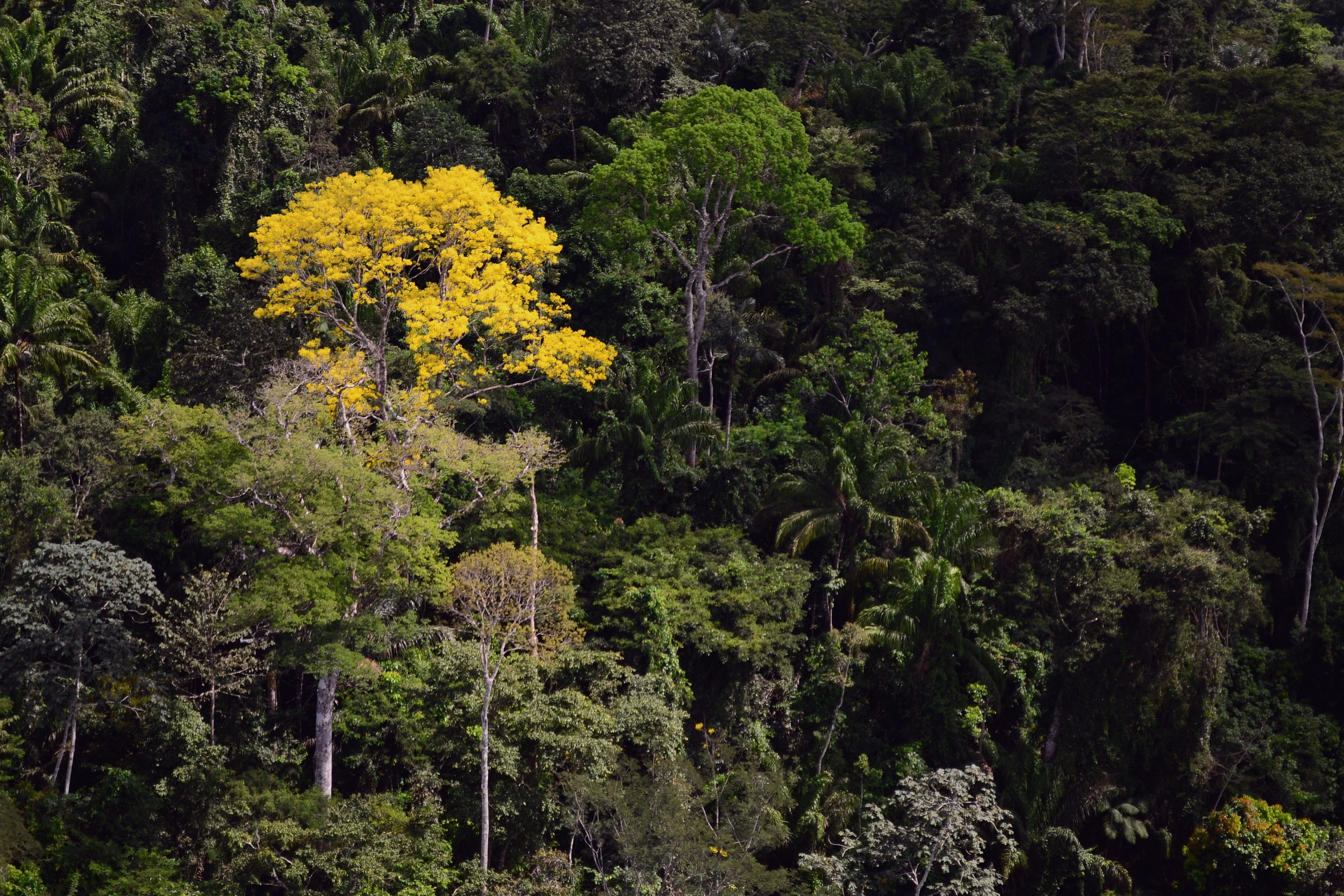 Sobrevoo na Floresta Amazônica em Novo Progresso, Pará. Foto: Vinícius Mendonça - Ascom/Ibama.